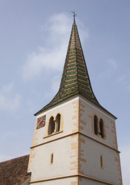 Pfarrkirche St. Ottilia, Randegg, Gemeinde Gottmadingen, Landkreis Konstanz Turm